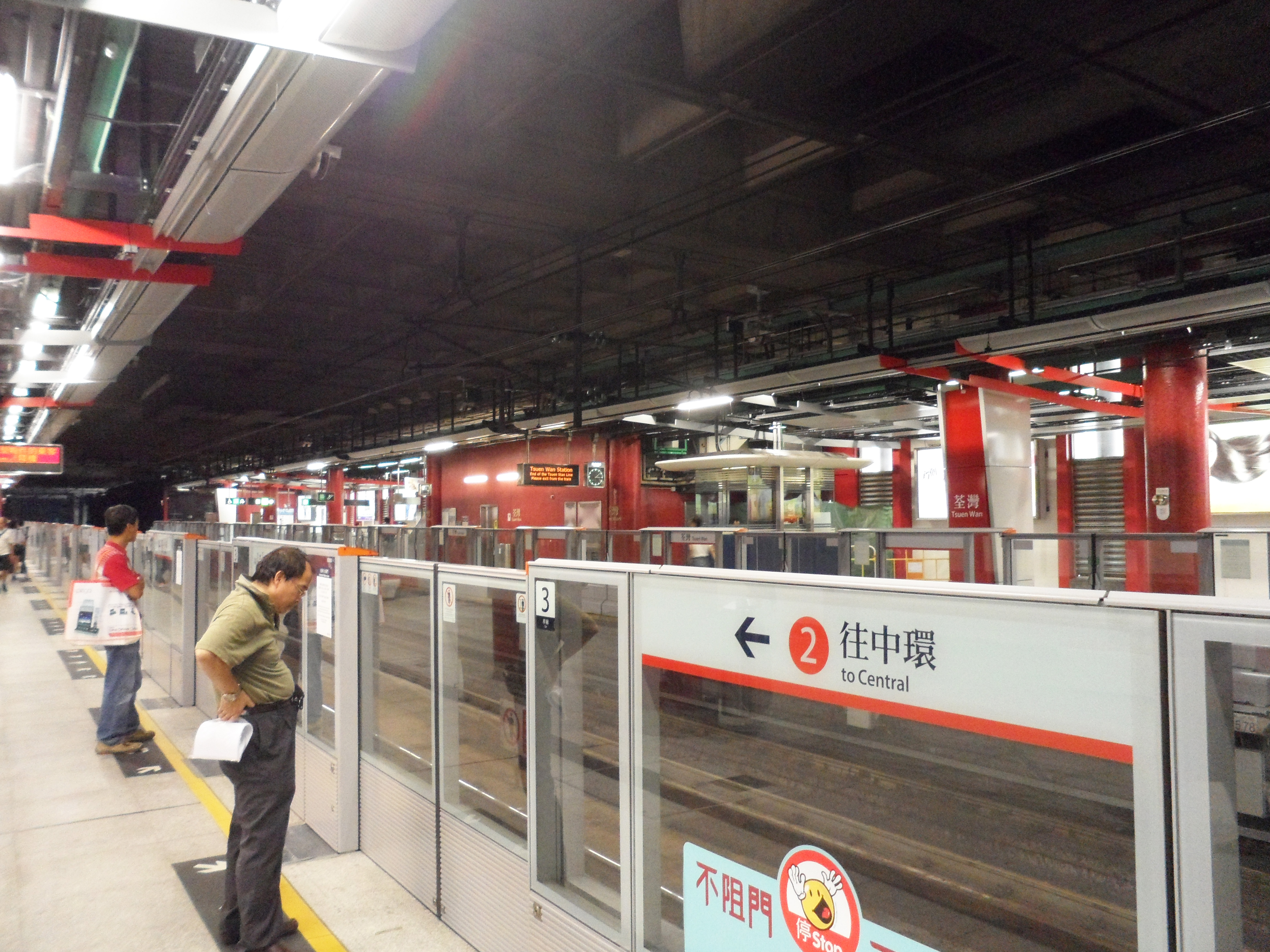 港鐵荃灣站月台中央